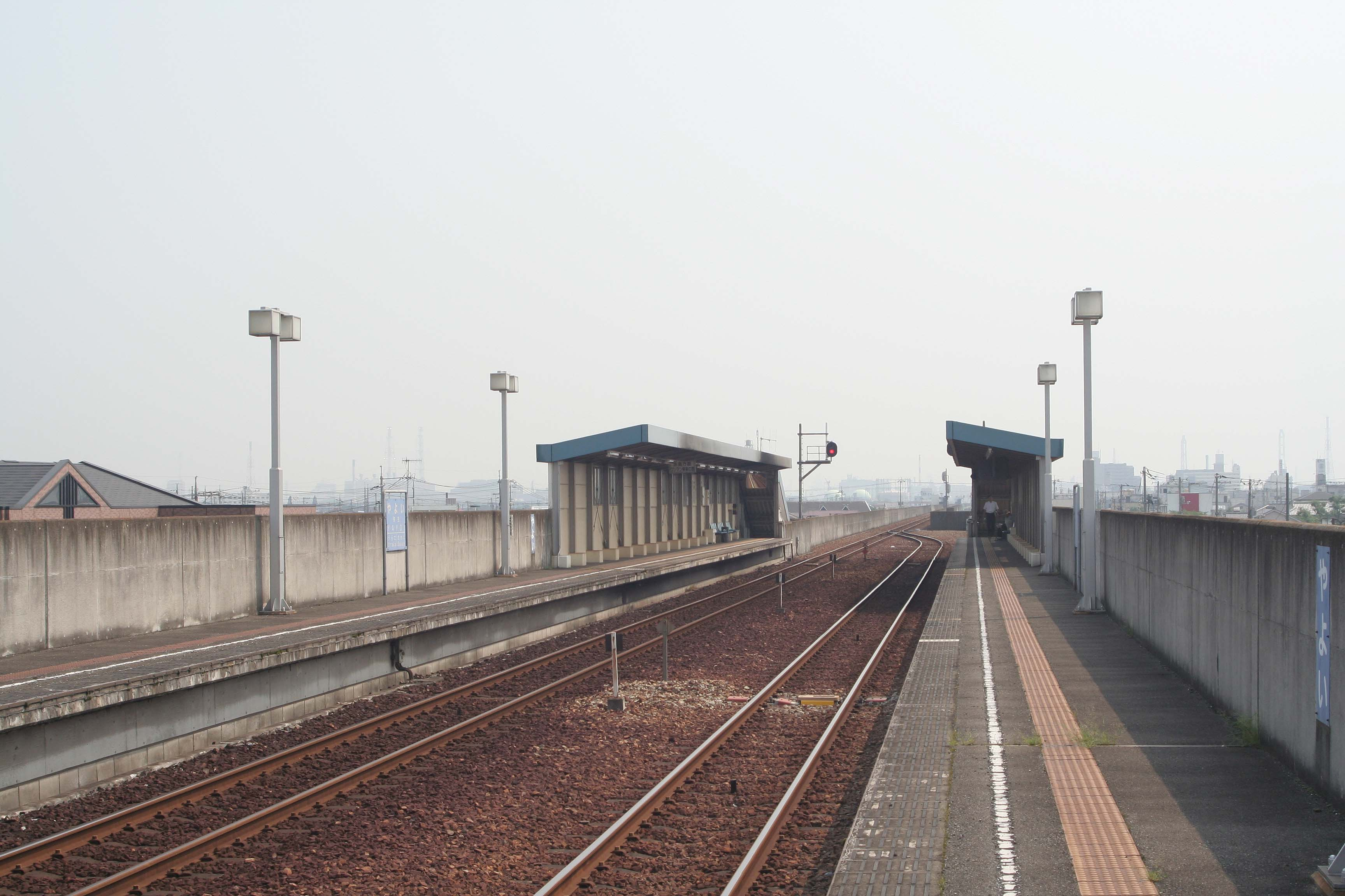 弥生駅の構内